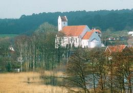 Draaby kirke, Dråby Sogn, Mols Herred, Randers Amt, Denmark